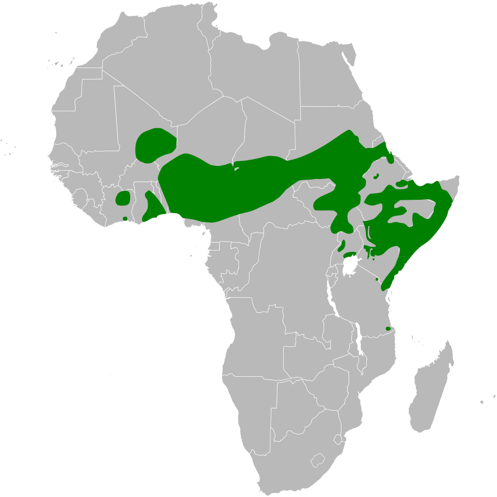 Hirundo aethiopica distribution map, based on